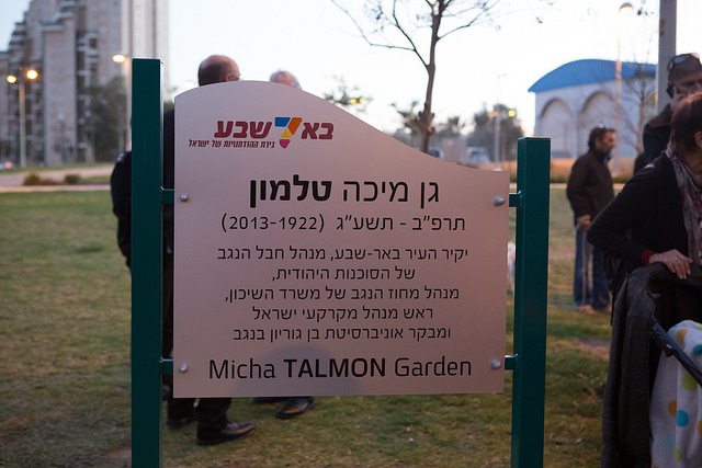 גן מיכה טלמון , פארק בדרום העיר באר שבע